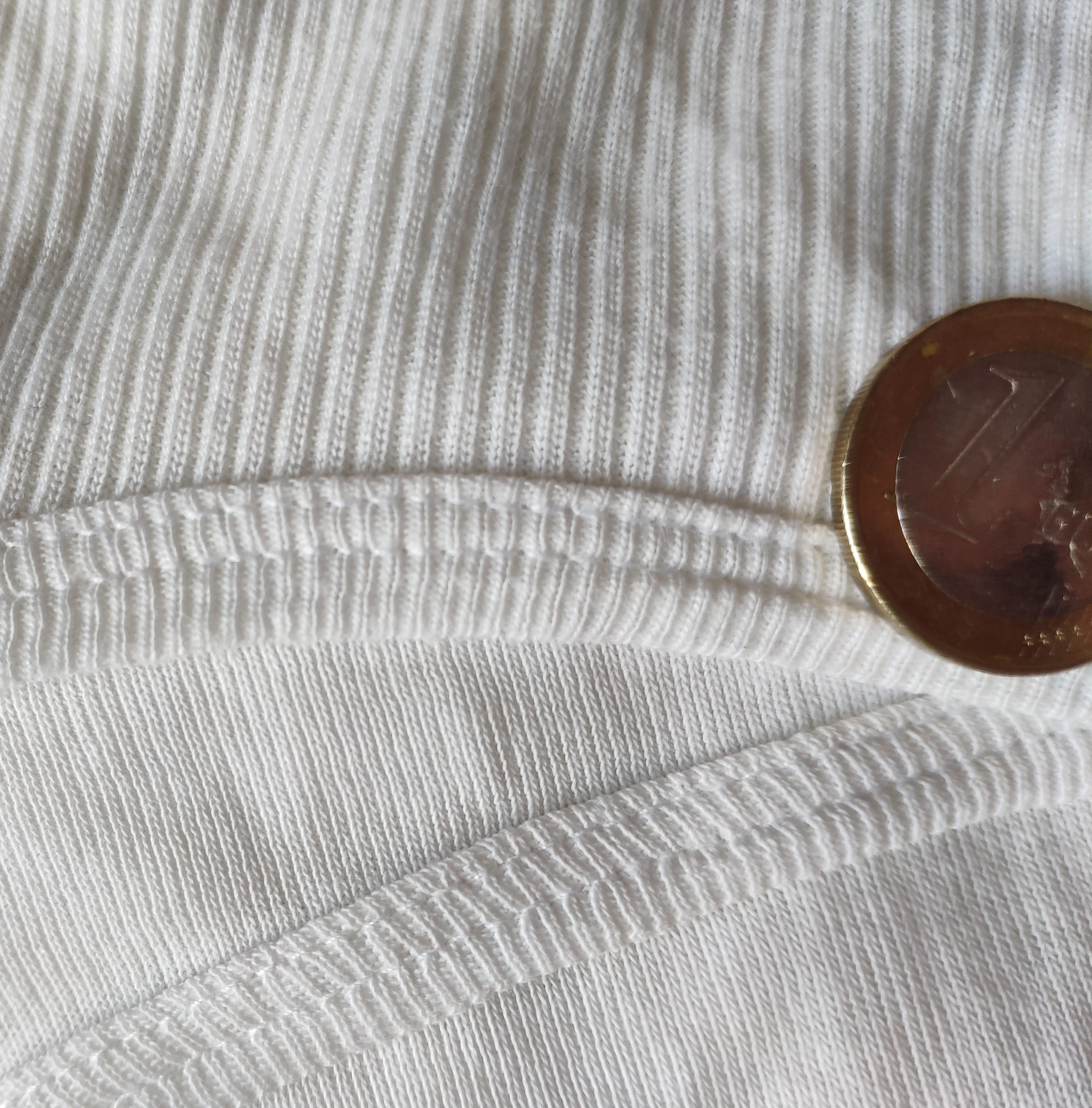 Unterwäsche. Oben Doppelripp, unten Feinripp